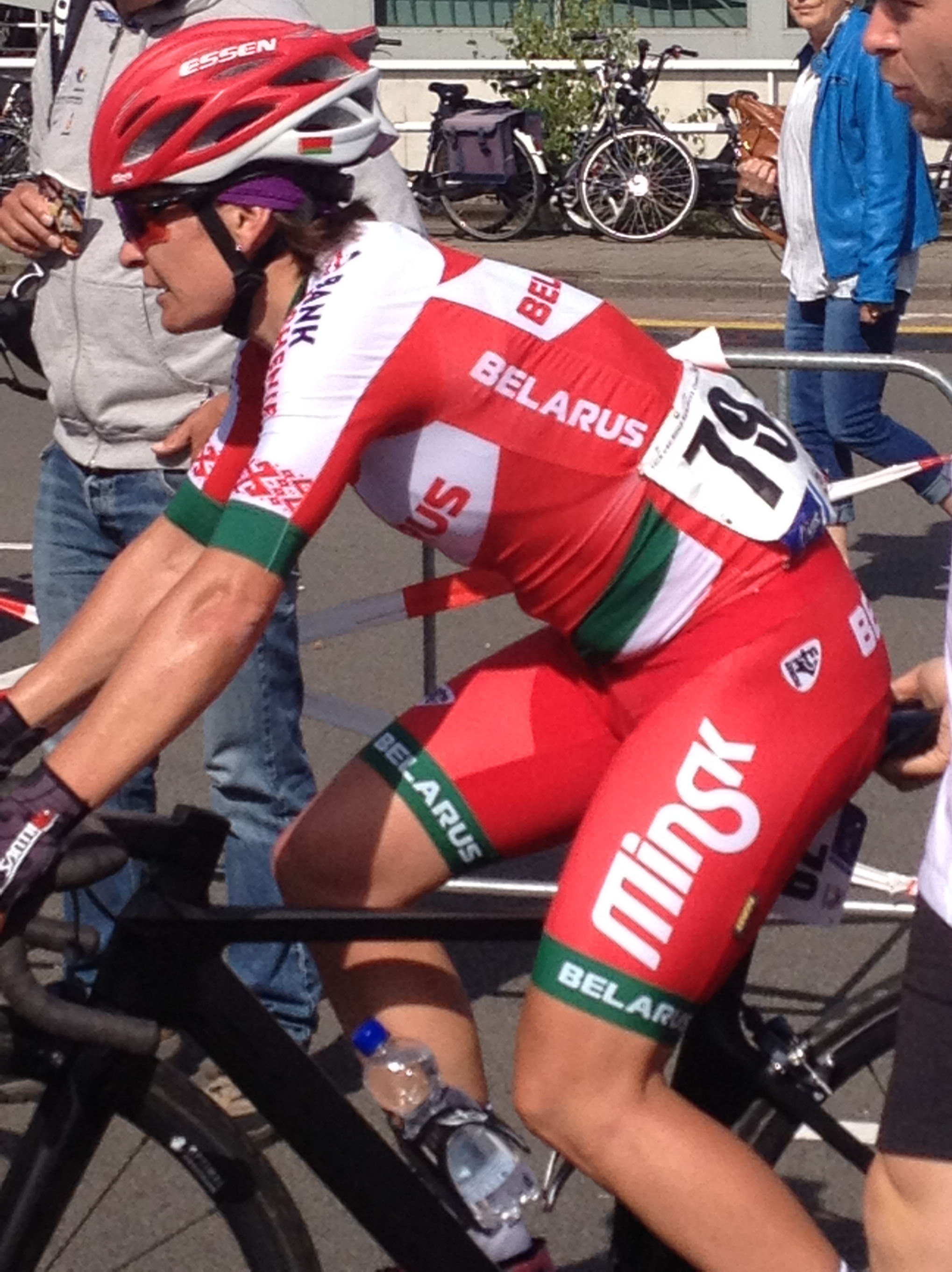 Wegwedstrijd voor vrouwen elite tijdens de Europese kampioenschappen wielrennen in Alkmaar op zaterdag 10 augustus 2019.